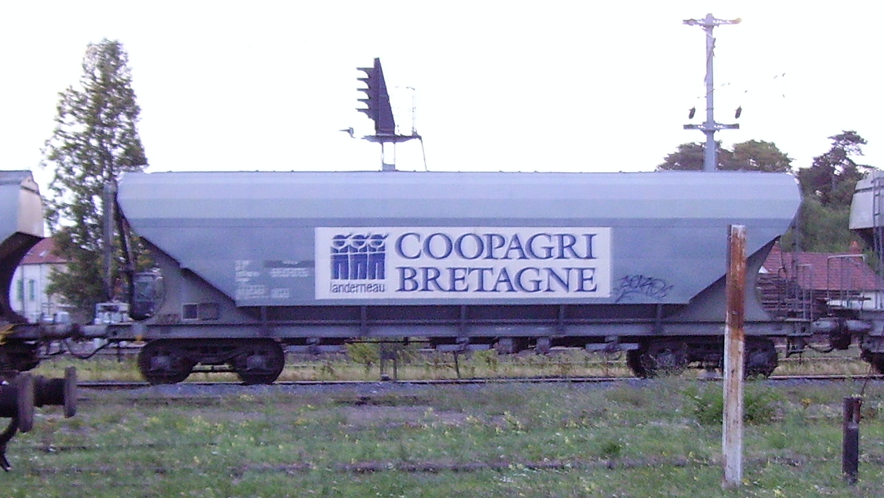 Un wagon portant le logo Coopagri Bretagne, fait partie d'un convoi de marchandises d'une trentaine de wagons (tracté par la BB 75464 accouplée à la BB 75448). Le train traverse à 30 km/h la gare de Cosne-sur-Loire, en direction de Nevers, pour stationner plus de 30 min en sortie de gare (signal lumineux rouge d'arrêt). Photo prise depuis la rue Eugène Perreau, Nièvre, Bourgogne, France.